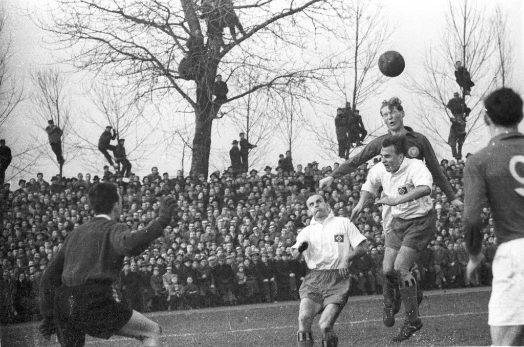 im Holsteinstadion vor 25.000 Zuschauern. Im Bild u.a. Holsteins Günther Matthies (2.v.r.) und Hamburgs Josef Posipal (3.v.r.).